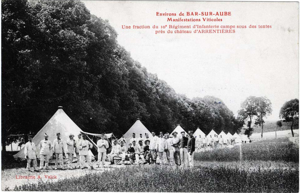 vue sur une carte postale du début XXE.